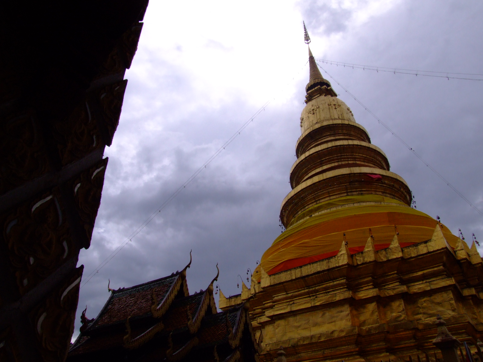 วัดพระบรมธาตุหริภุญชัยวรมหาวิหาร หมวดหมู่:ภาพวัดไทย สัญญาอนุญาต The present photo is taken or owned by Thanyakij. The camera used was: Fujifilm Finepix S9500.